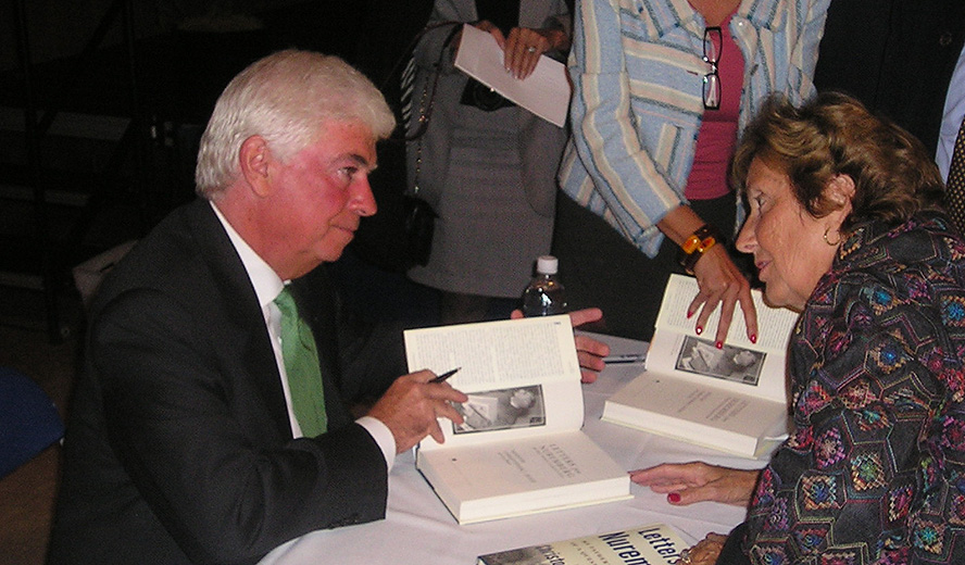 Sen. Christopher Dodd